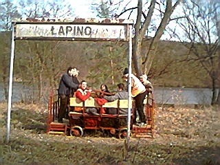 Drezyna Kolei Drezynowej z siedzibą w Kolbudach na stacji Łapino w czasie wycieczki w dniu 3 kwietnia 2004.